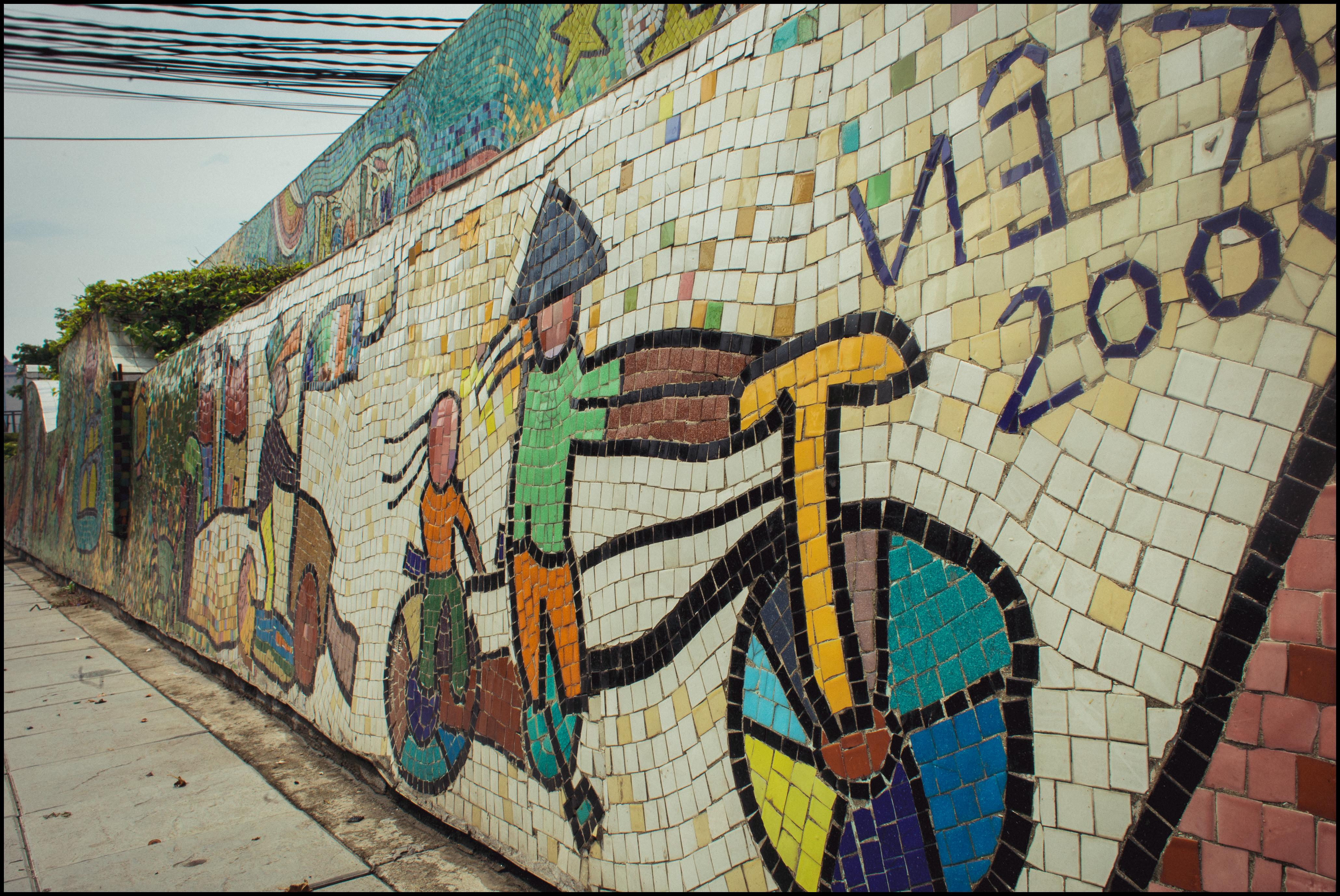 Hanoi, Vietnam